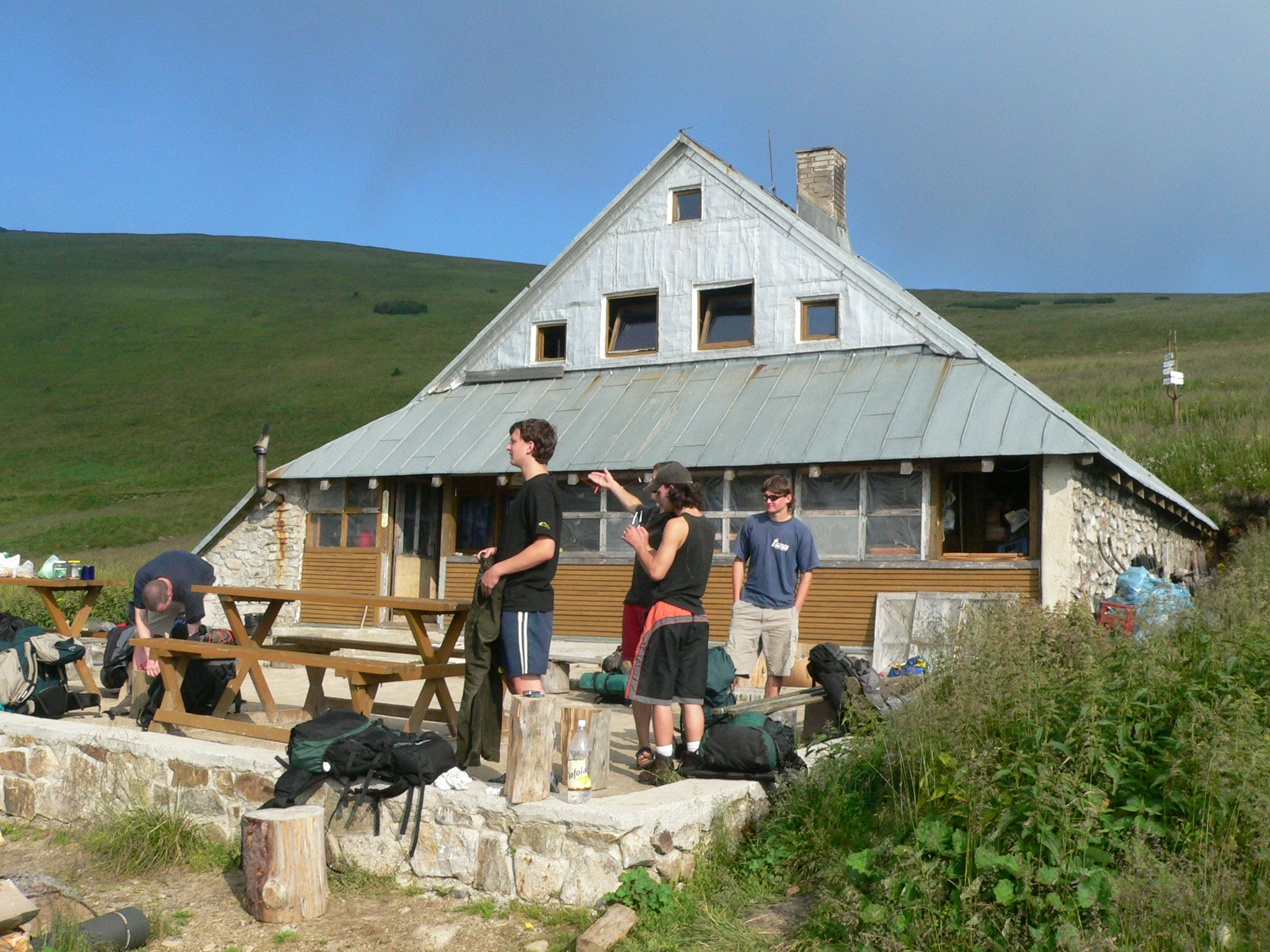 Fotografie turistické útulny pod Chabencom, Nízké Tatry, autorem jsem já-EmilZatopek